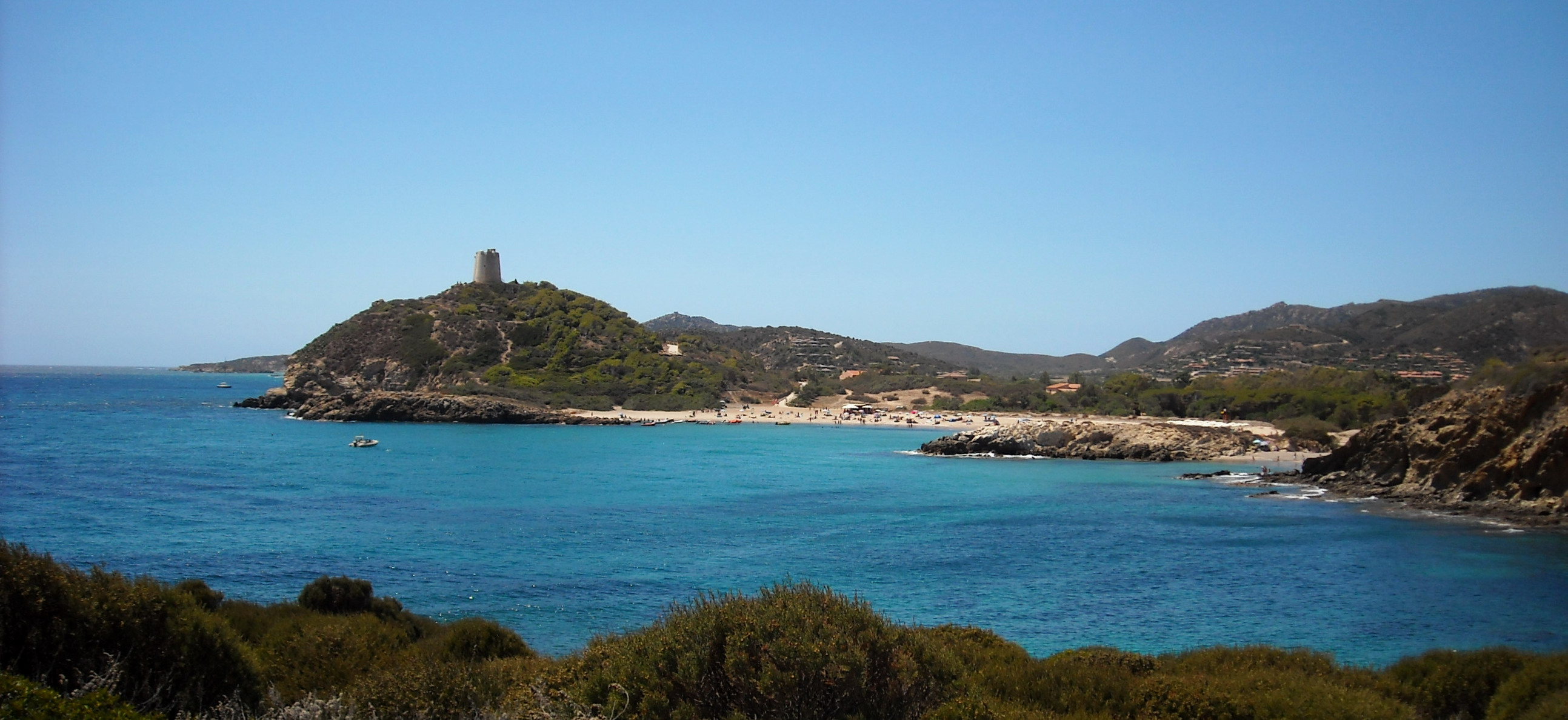 Chia, Domus de Maria (Cagliari)